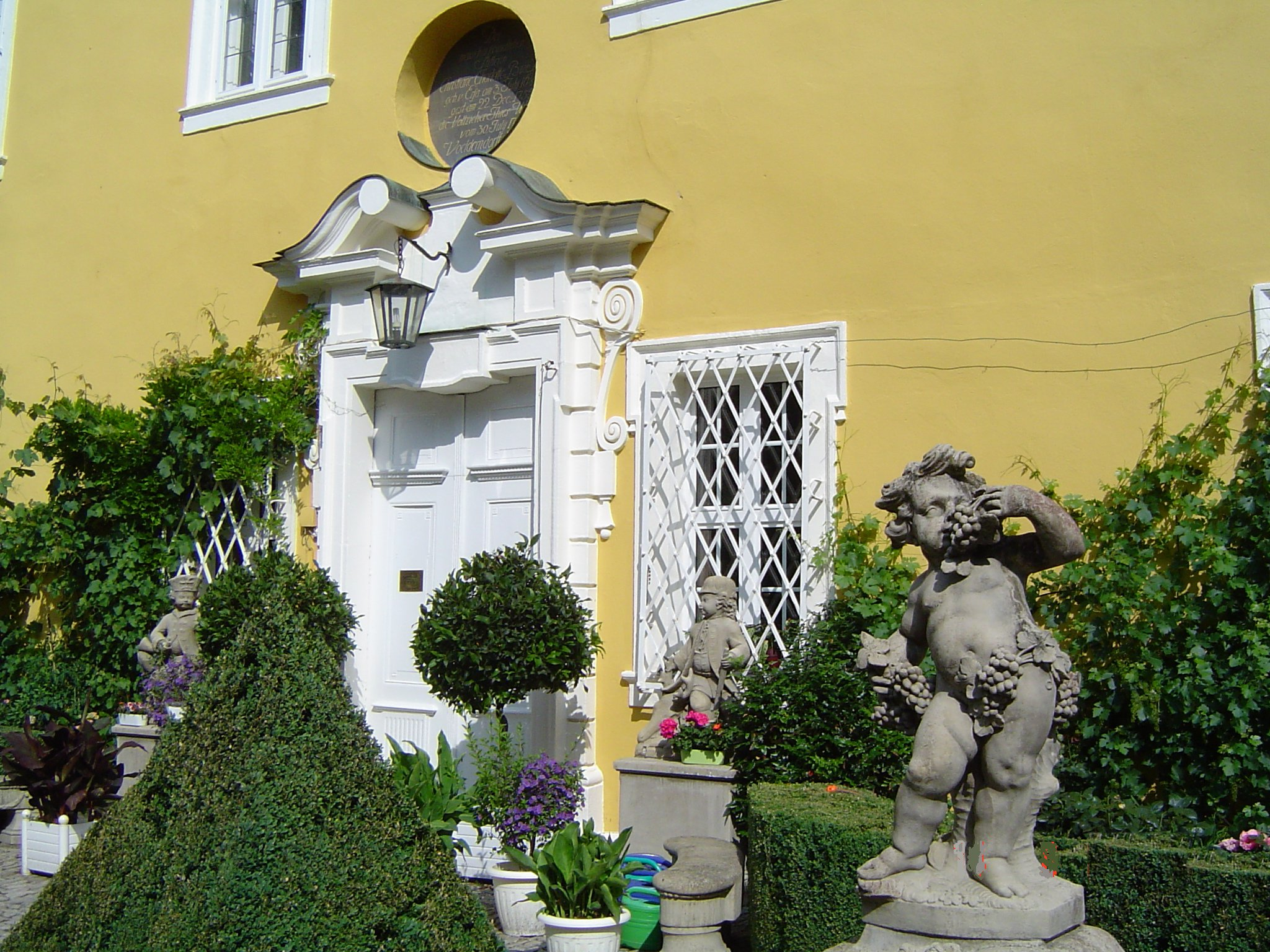 Bayreuth – Schloss Birken (Haupteingang)